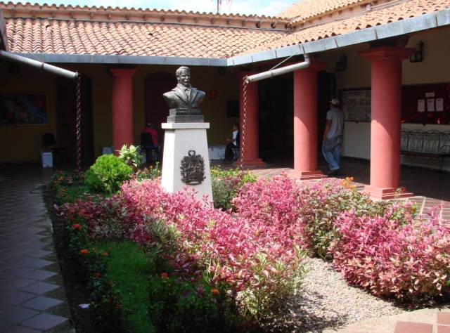 Sarare-AlcaldiaInterior